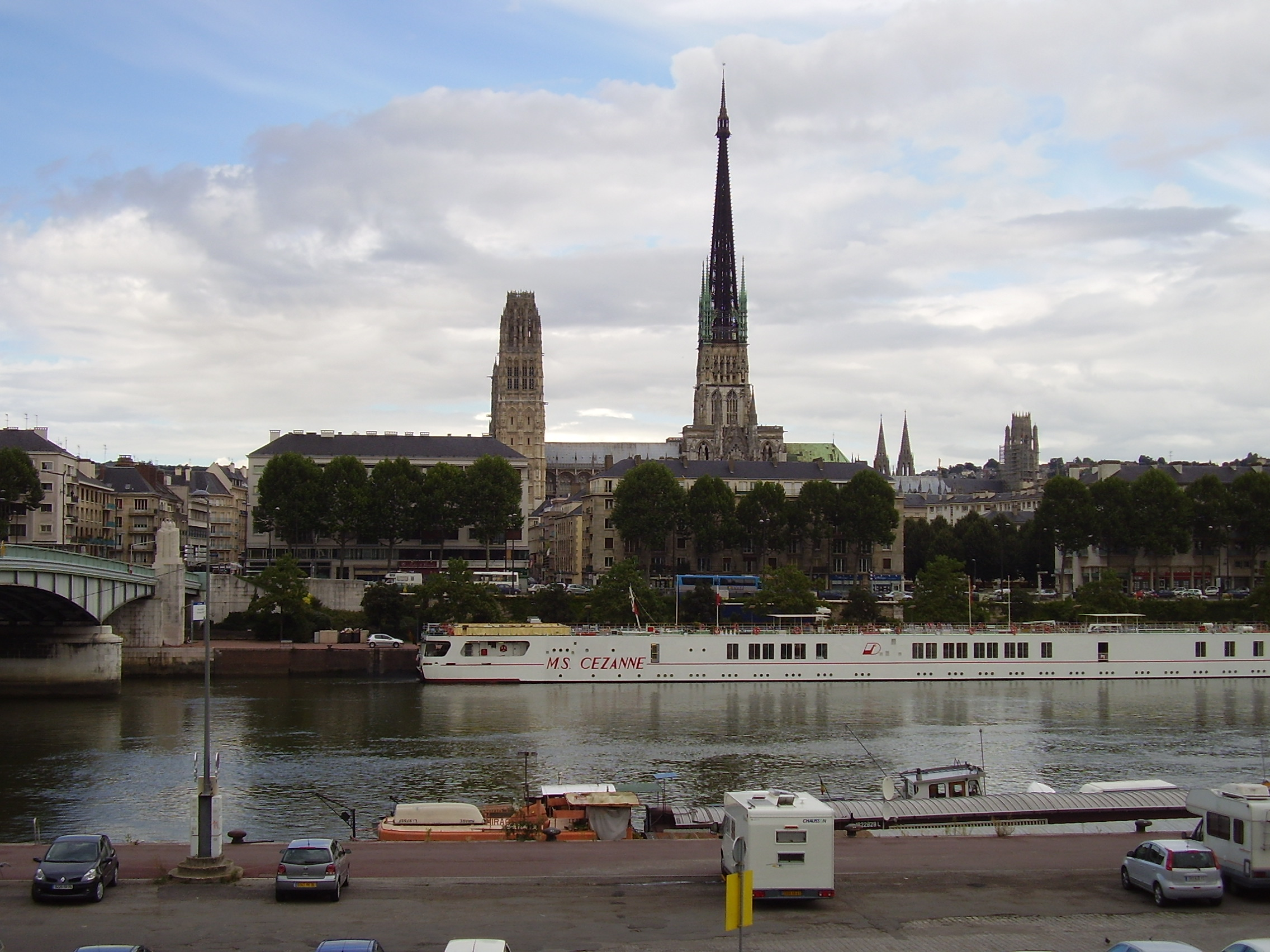 Rouen, France